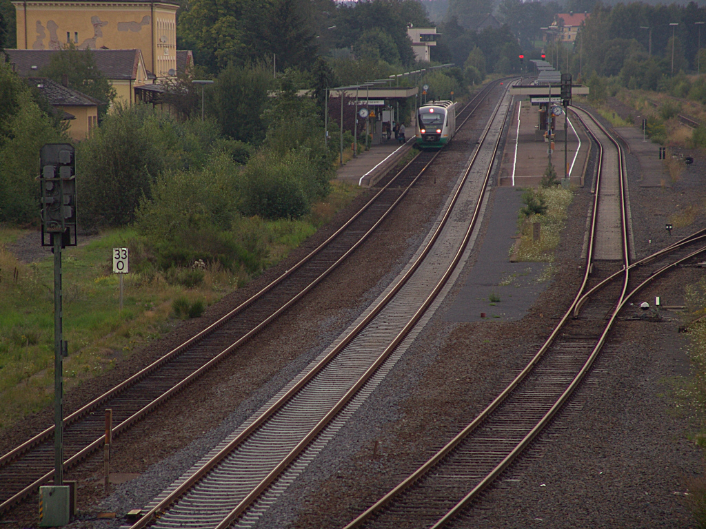 Bahnhof in Wiesau, Bayern, Deutschland. (2005)